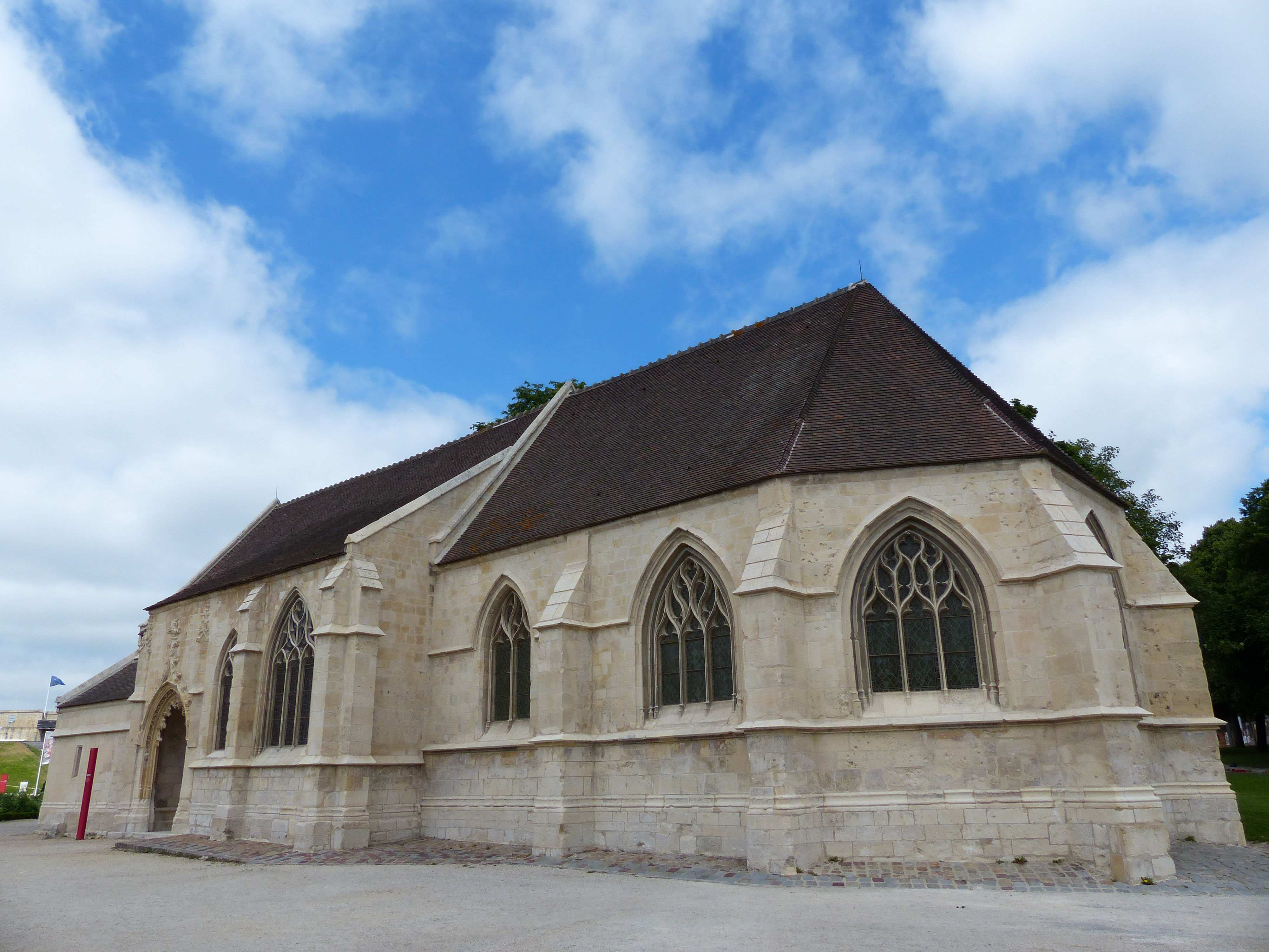 église Saint-Georges-du-Château à Caen (Calvados, Basse-Normandie) après restauration.